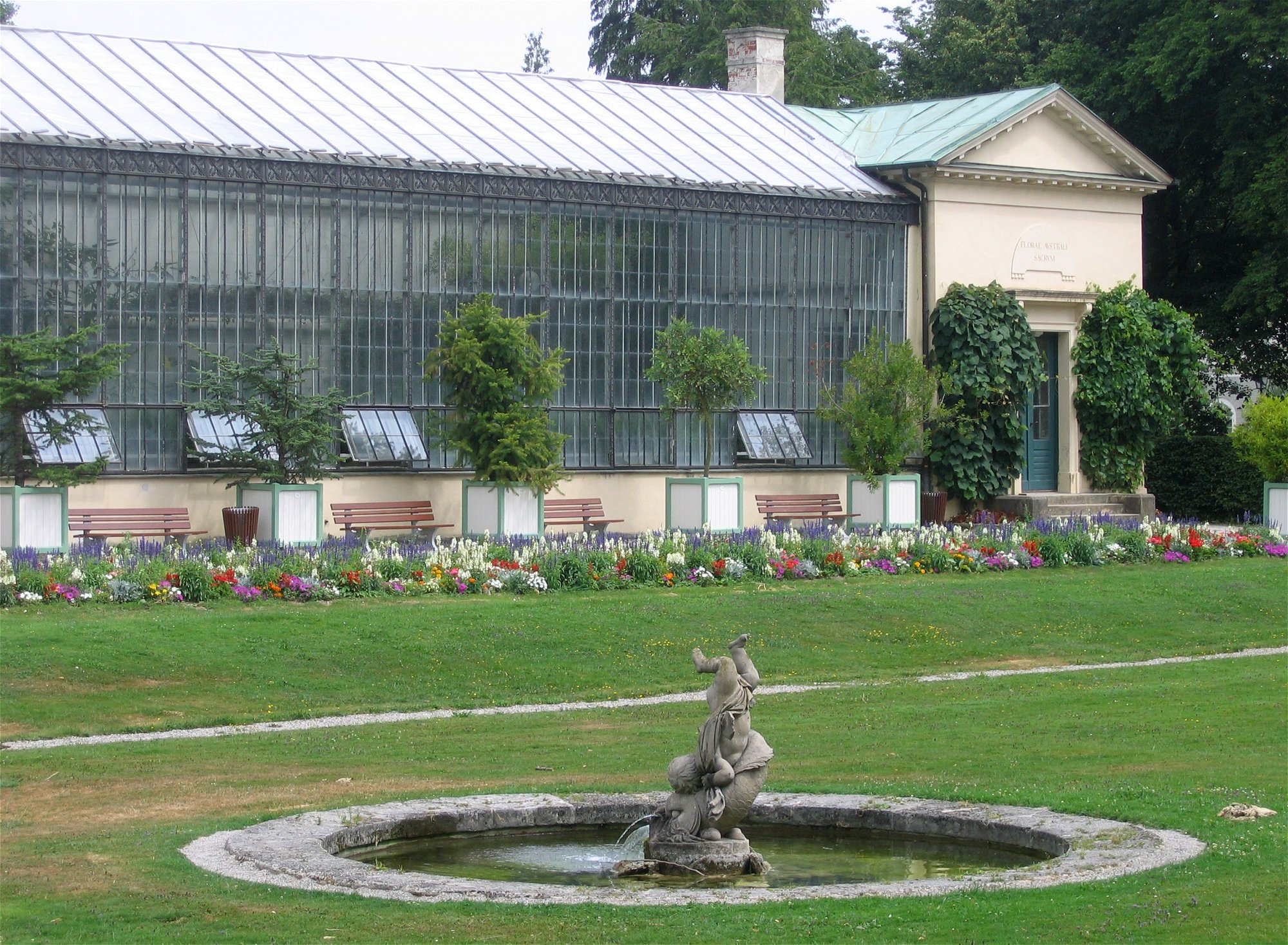 Das Eiserne Haus im Schlosspark Nymphenburg, Muenchen